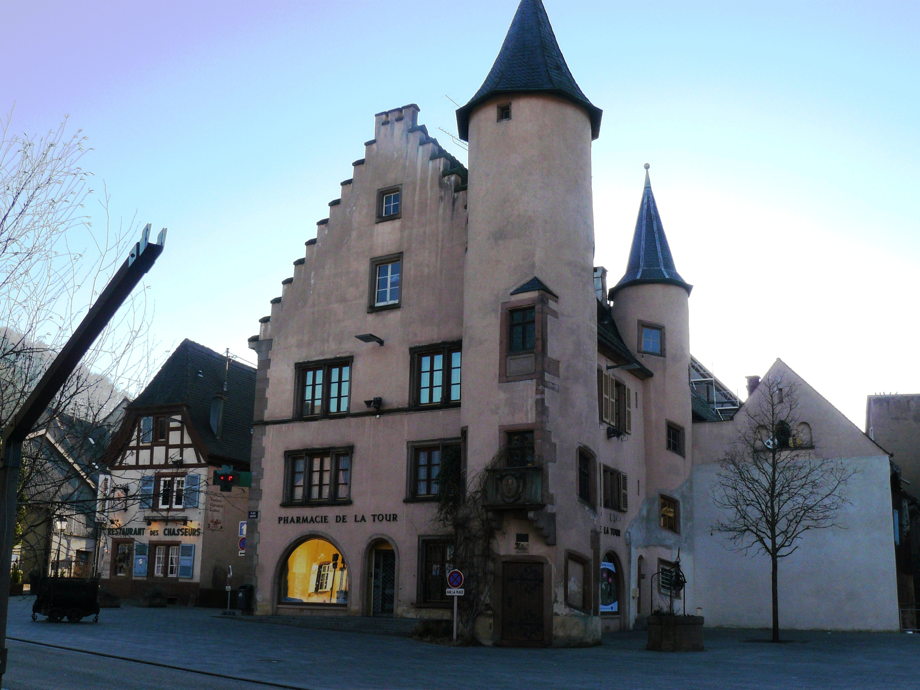 Pharmacie de la Tour. Ancien siège de l'administration minière au milieu du XVIe siècle, puis Hôtel de ville.